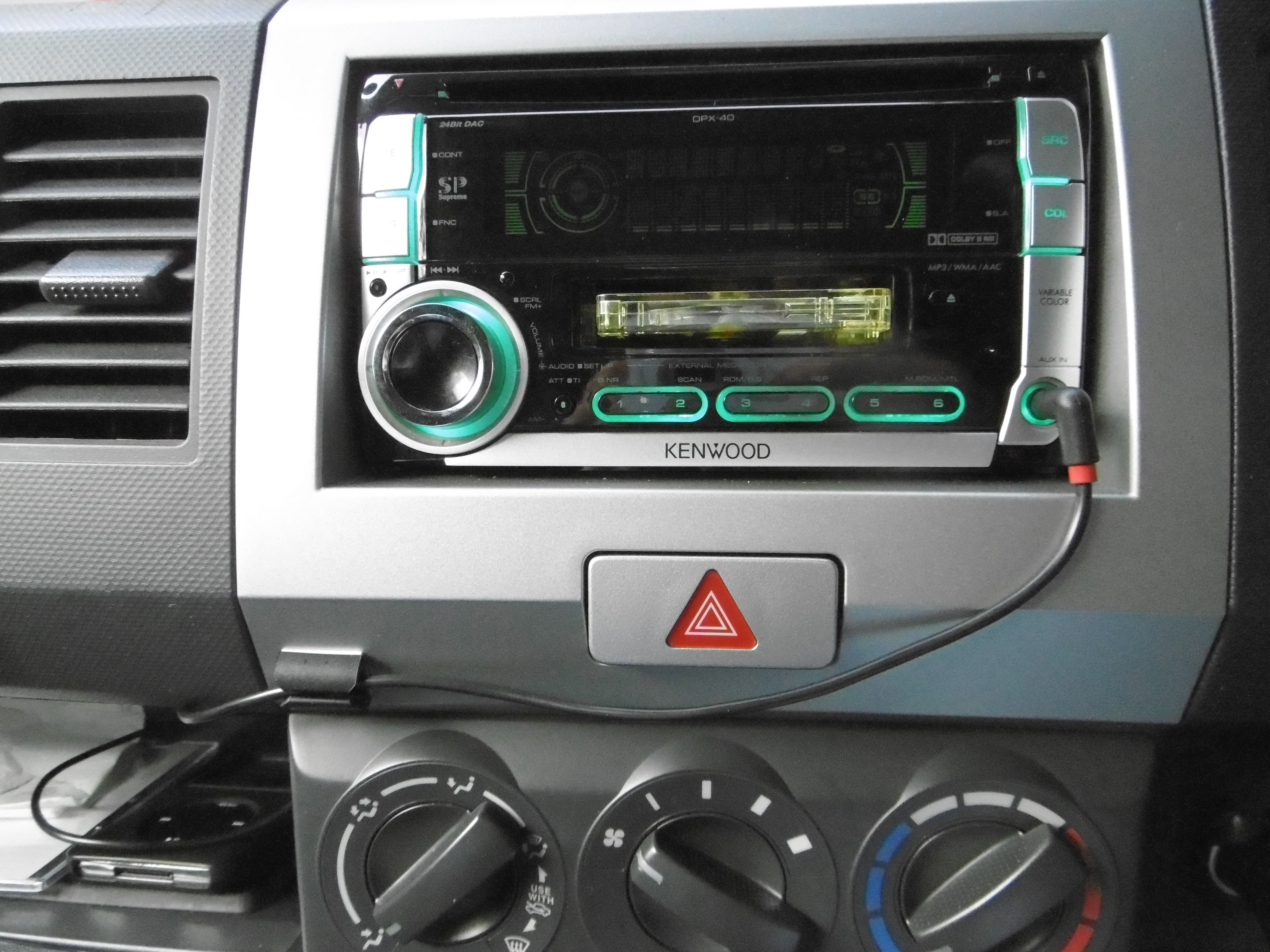 撮影者本人の所有車両とカーオーディオです。 車両：2005年登録AZワゴン(MJ21S) カーオーディオ：2008年製ケンウッドCDカセットレシーバー(DPX-40) デジタルオーディオプレイヤー：2013年製iPod classic (Fall 2009)